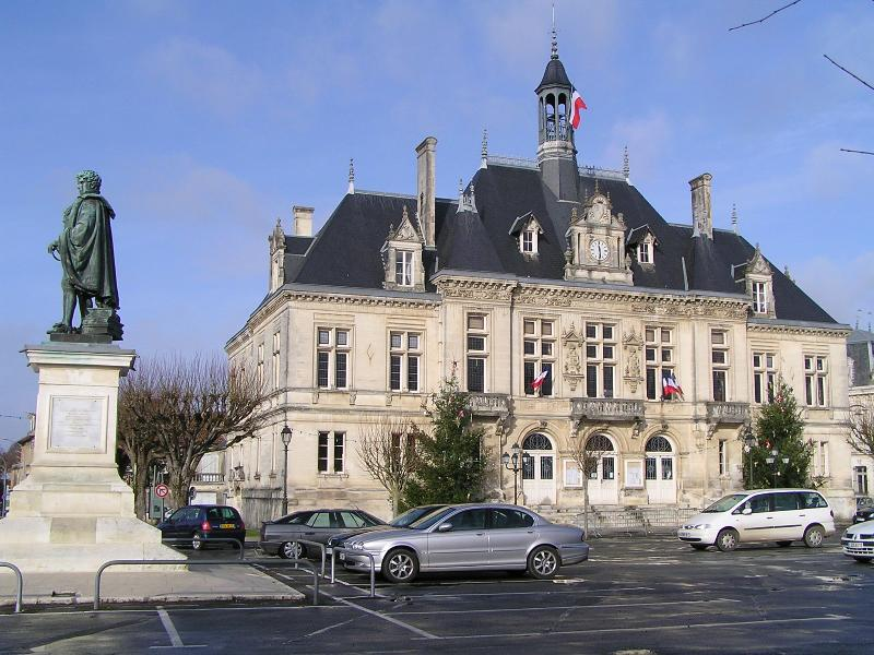 mairie de Saint-Jean-d'Angély